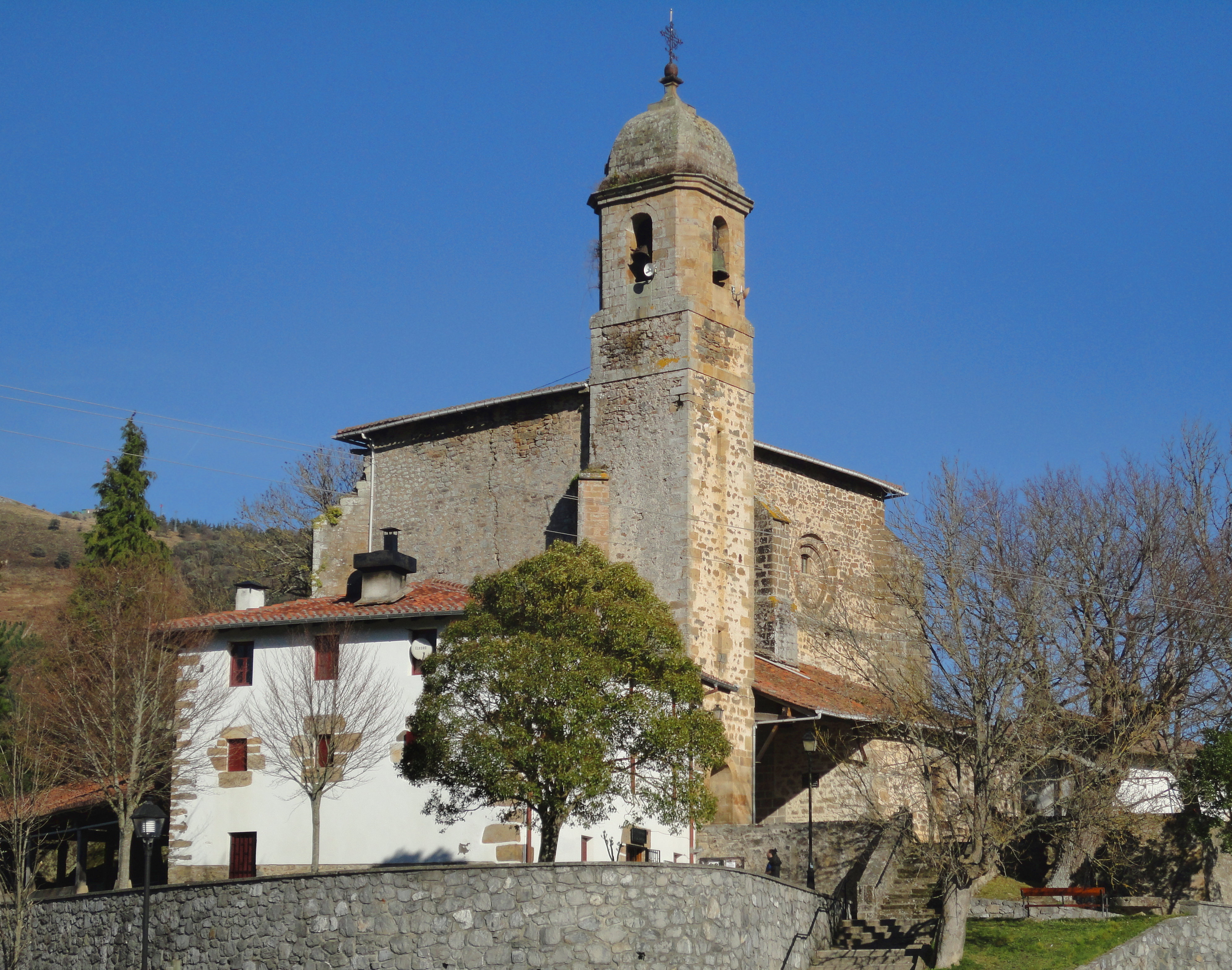 San Pedro eliza - Untzilla